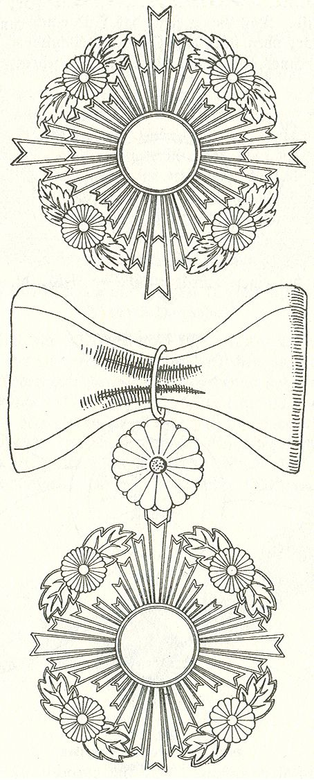 Scan van Blz. 180 en 182 van het boek "Handbuch der Ritter- und Verdienstorden " uitgegeven 1893 door Weber.Tekening van de in 1902 overleden Maximilian Gritzner. Robert Prummel 10 jul 2008 16:40 (CEST)